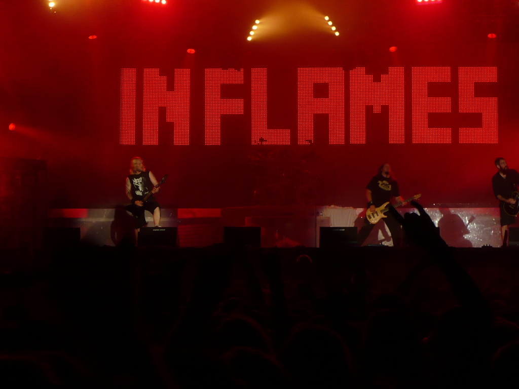 In Flames